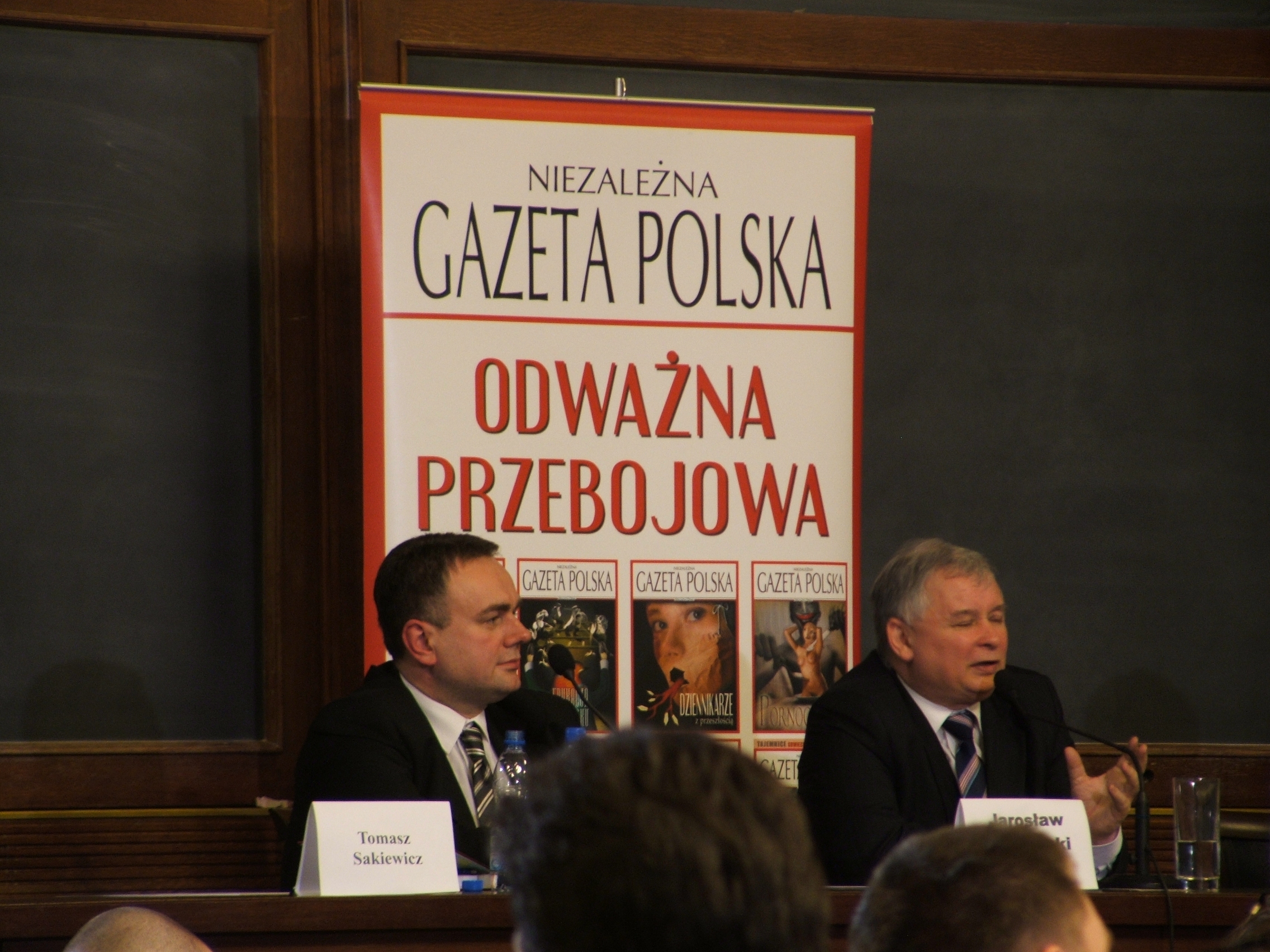 Jarosław Kaczyński i Tomasz Sakiewicz w czasie spotkanie ze studentami Uniwersytetu Warszawskiego w dn. 19 marca 2008